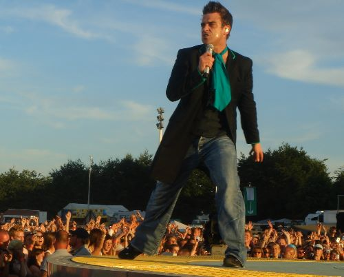 Robbie Williams in Hamburg